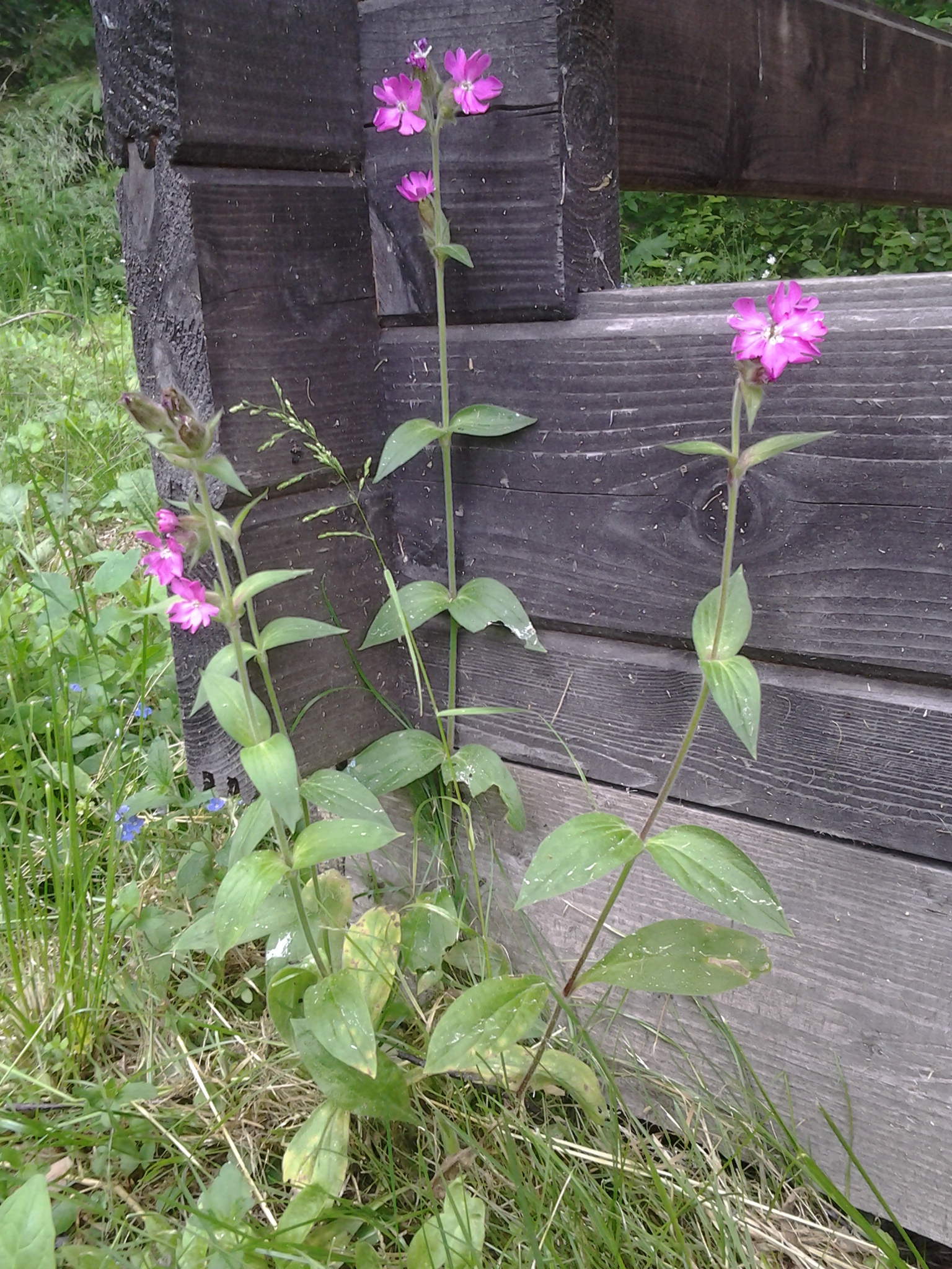 Punane pusurohi (Silene dioica)